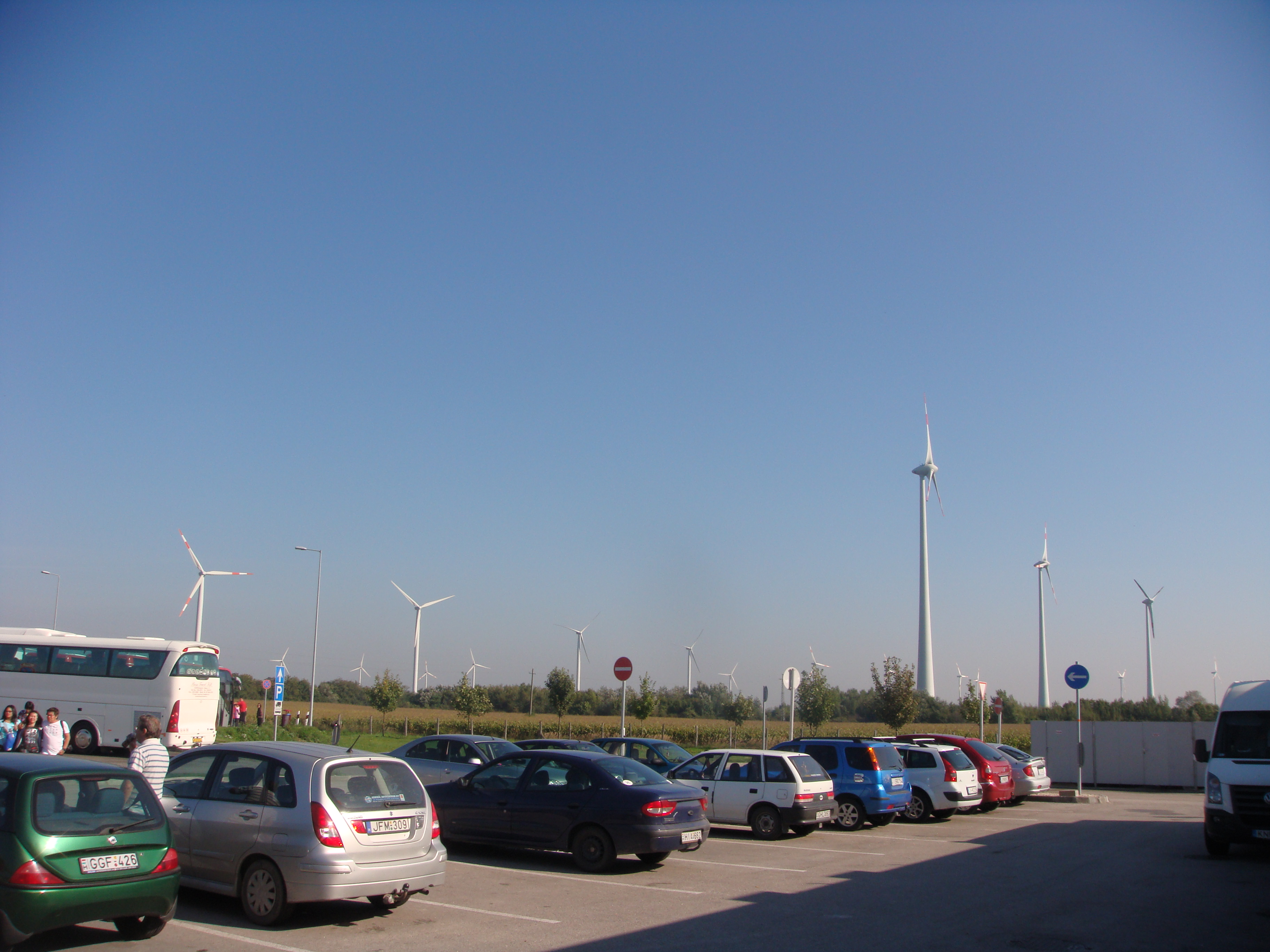 последний пункт перед Австрией